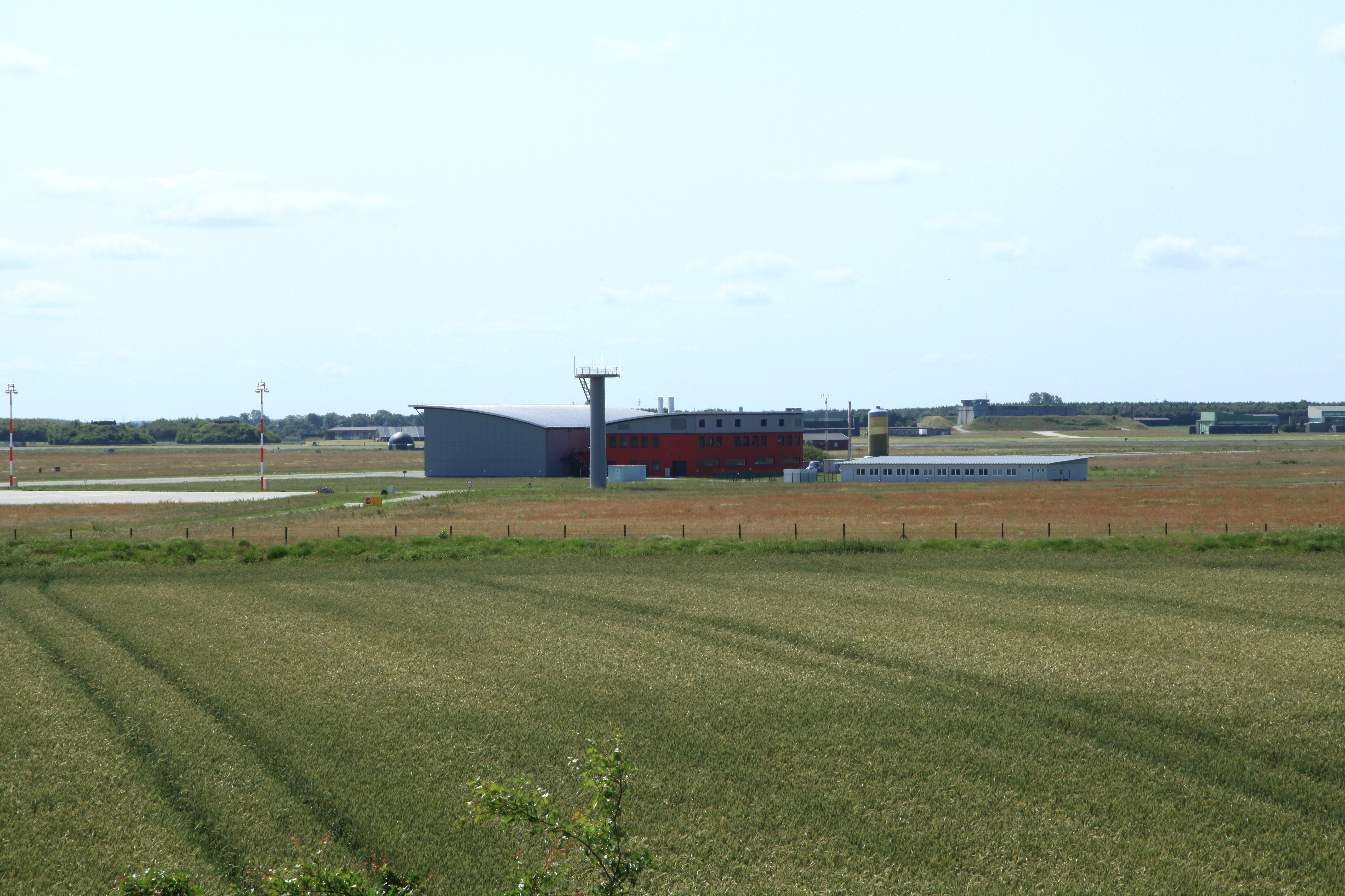 Blick vom Grabhügel Tweebargen auf den Kograben am Ochsenweg in Dannewerk, dahinter der Fliegerhorst Schleswig in Jagel